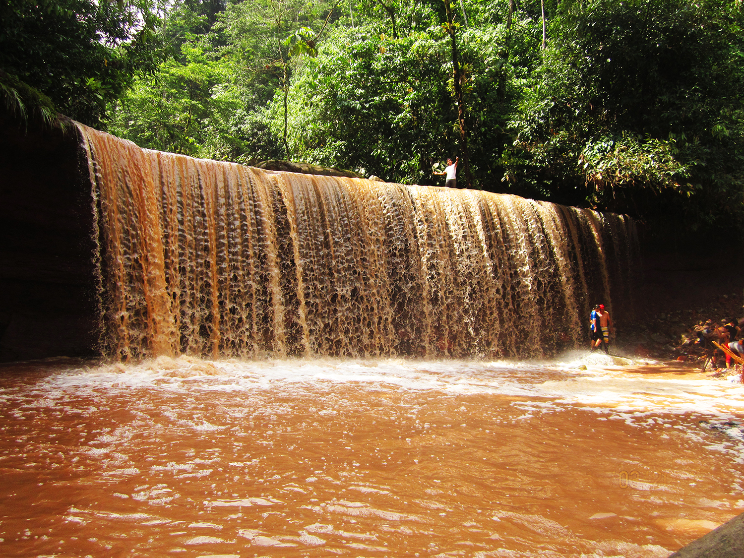 Cascada Cortina de Uchiza, en Santa Rosa de Shapaja